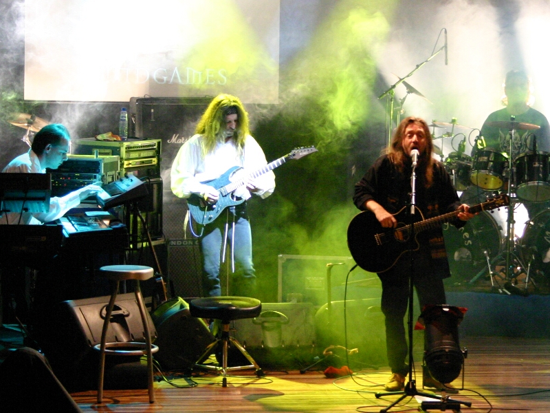 Foto die zelf genomen is tijdens een concert. Op Wikipedia geplaatst met toestemming van de groep Mindgames.